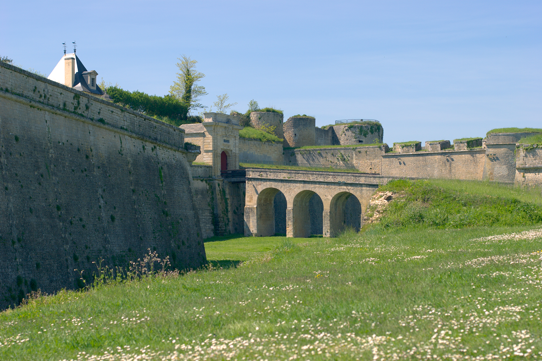 Blaye.